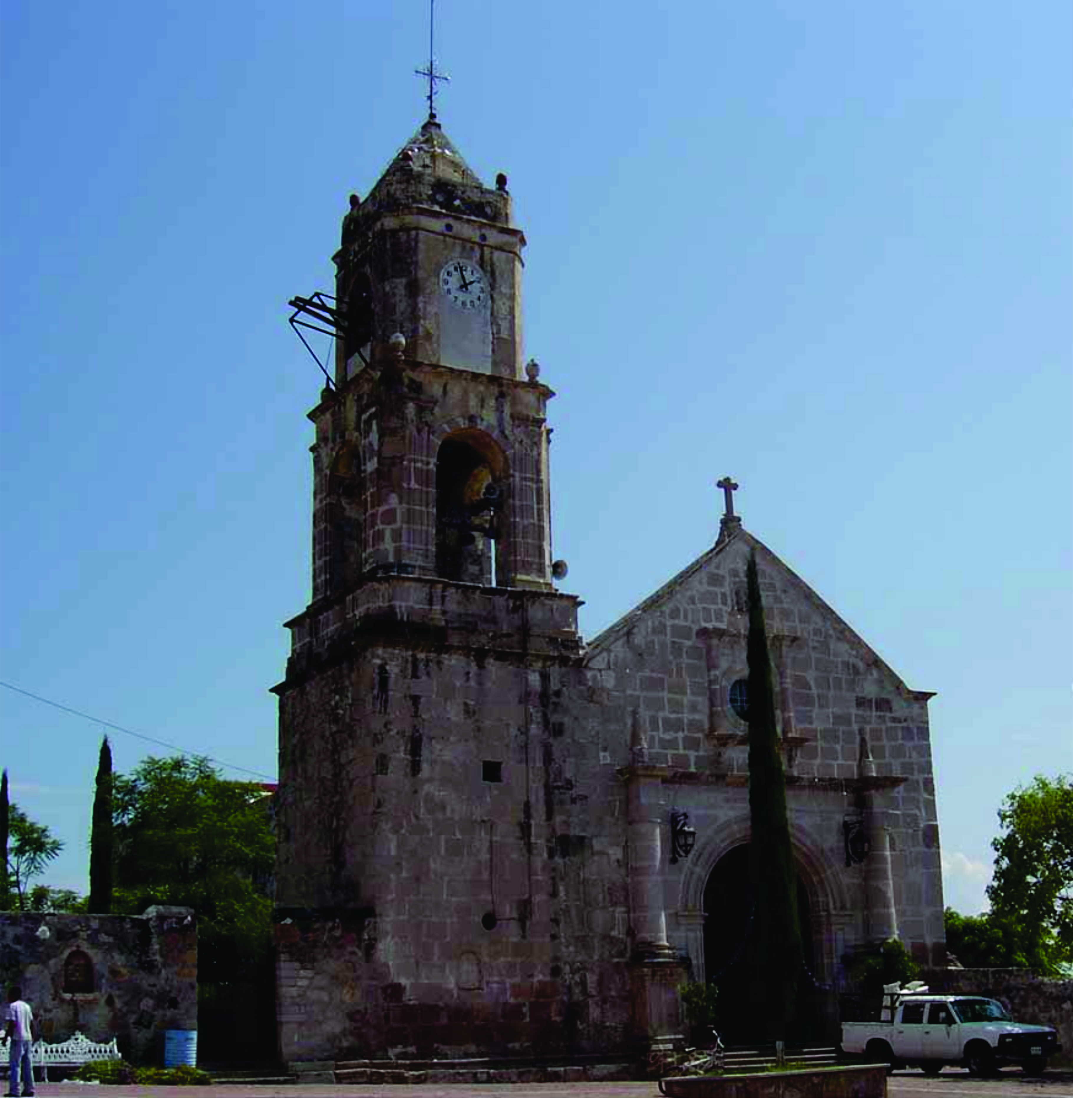 Templo del "Señor de La Expiracion" de la comunidad de Capacho